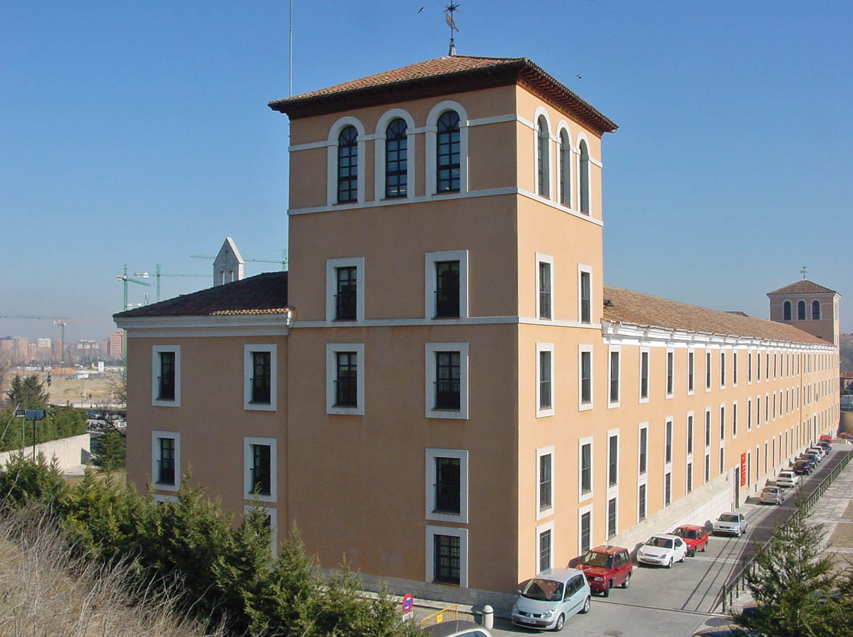 Valladolid, España. Monasterio jerónimo de Nuestra Señora del Prado, edificio del siglo XVII. Vista general.